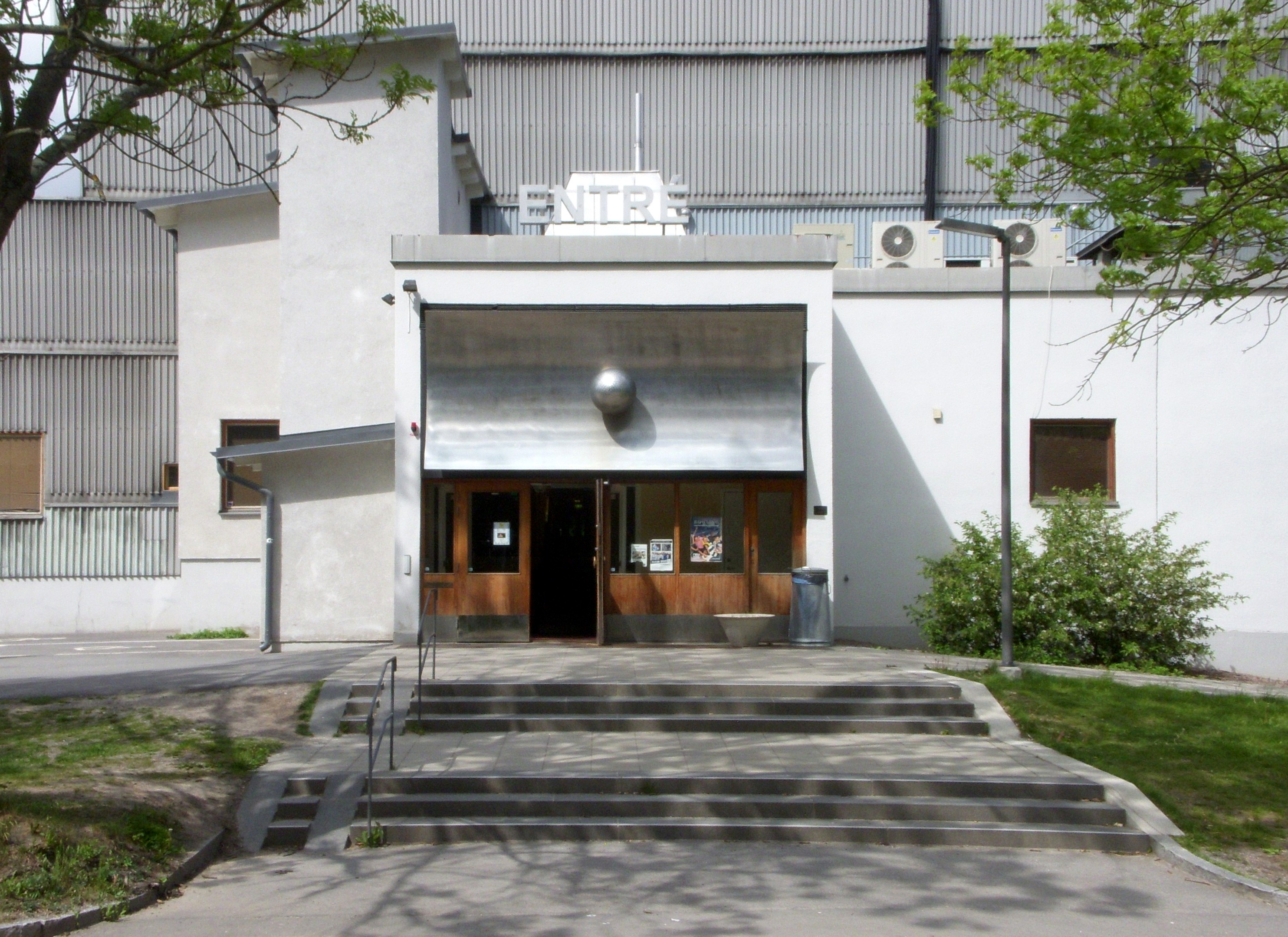 Enskedehallens entré. Ovanför entrén sitter den abstrakta skulpturen Härere ("Här är det") av Elis Eriksson.